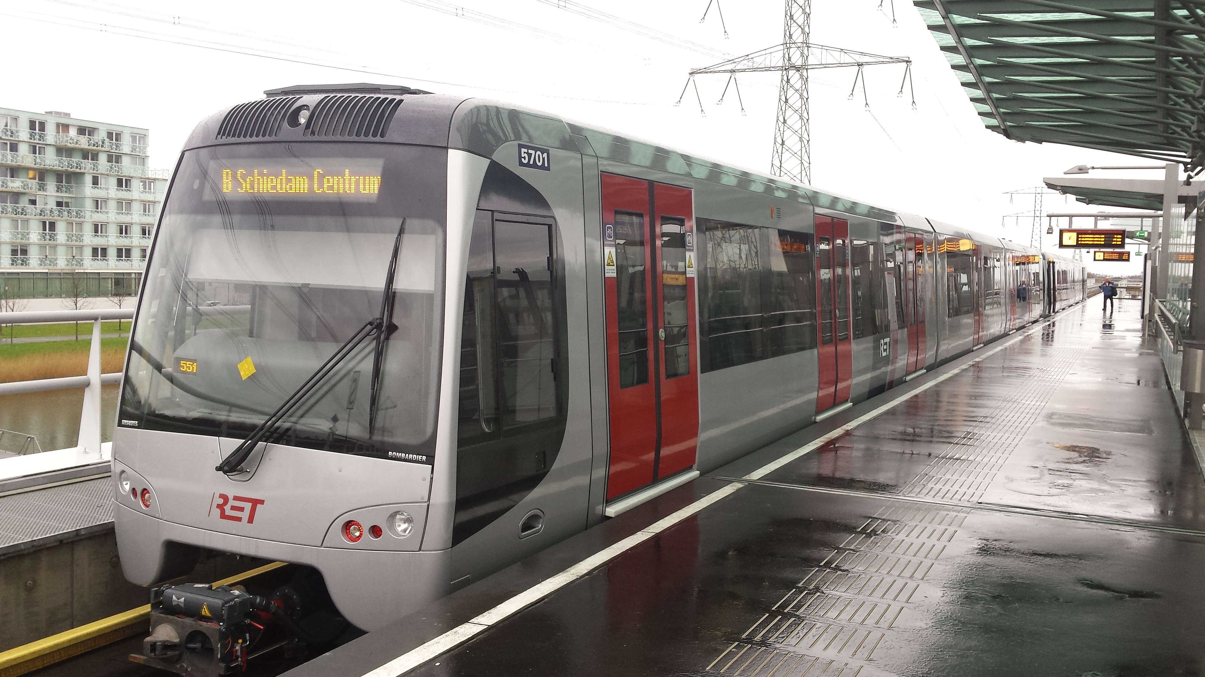 HSG3 5701-5702 Nesselande